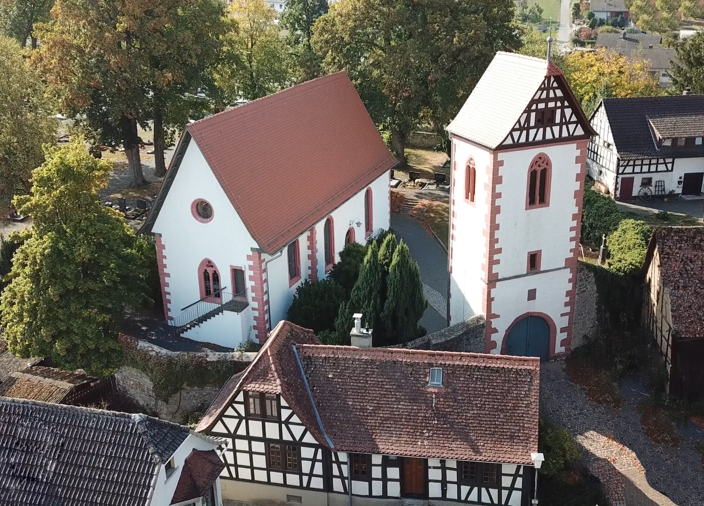 Die mittelalterliche Wehrkirche zu Wersau, mit dem im Jahre 1631 auf die Wehrmauer gebauten Tor- und Glockenturm - dem Wahrzeichen Wersaus.